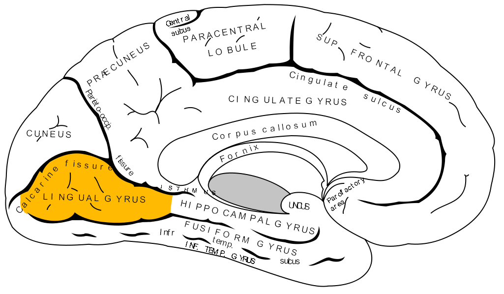 Precuneus.